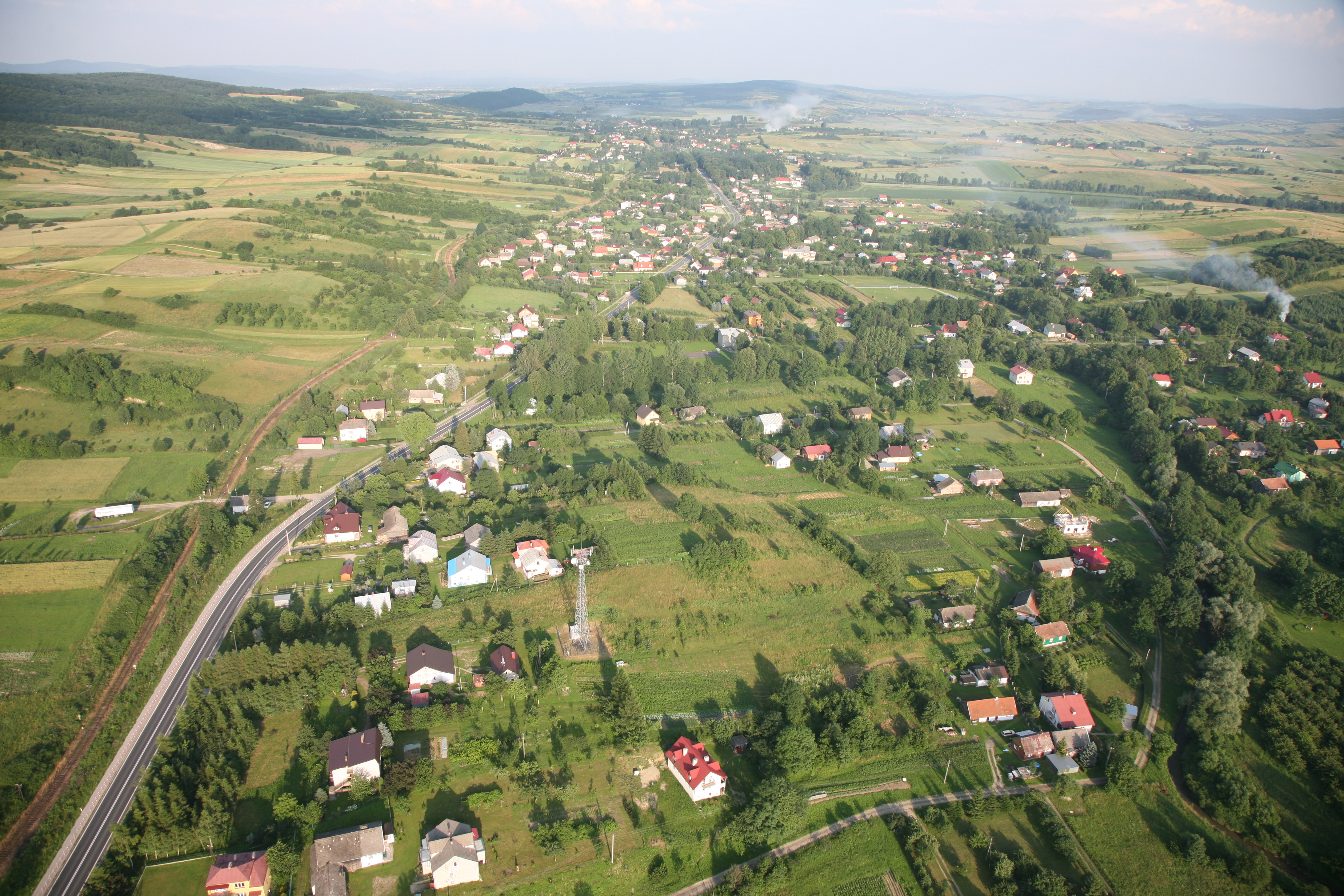 Nowosielce z lotu ptaka